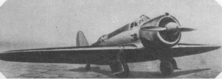 Něman R-10